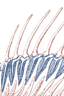 Rückenflossen-Hartstrahlen eines Barsches (rötlich: Hartstrahlen, blau: Flossenstrahlträger)